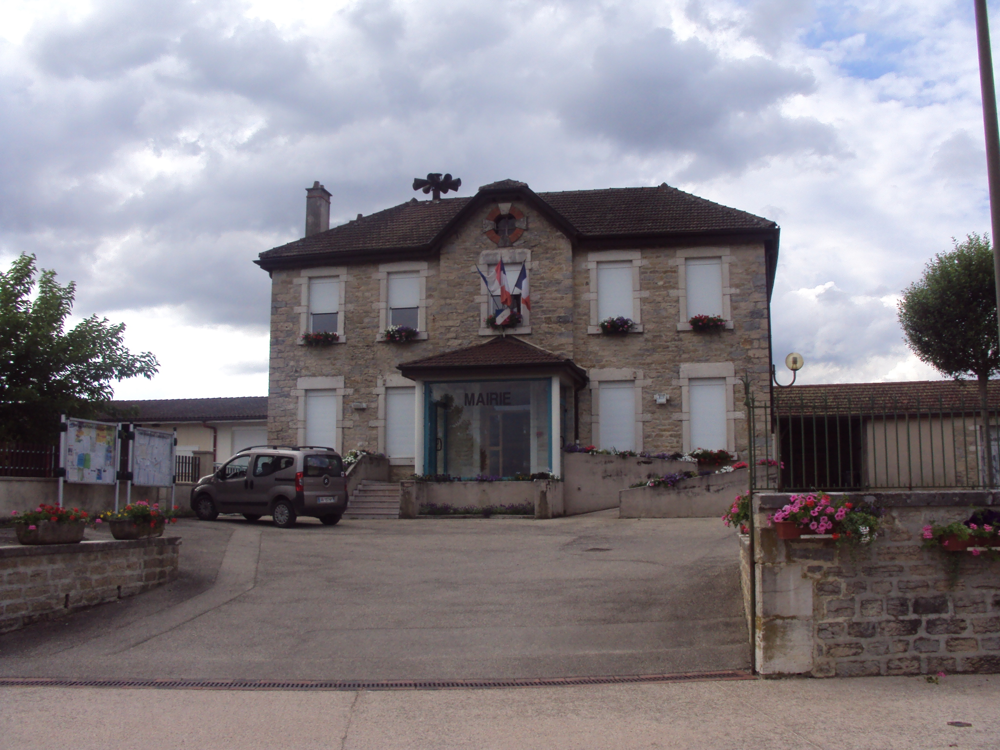 Mairie de Montagnat, Ain, France.